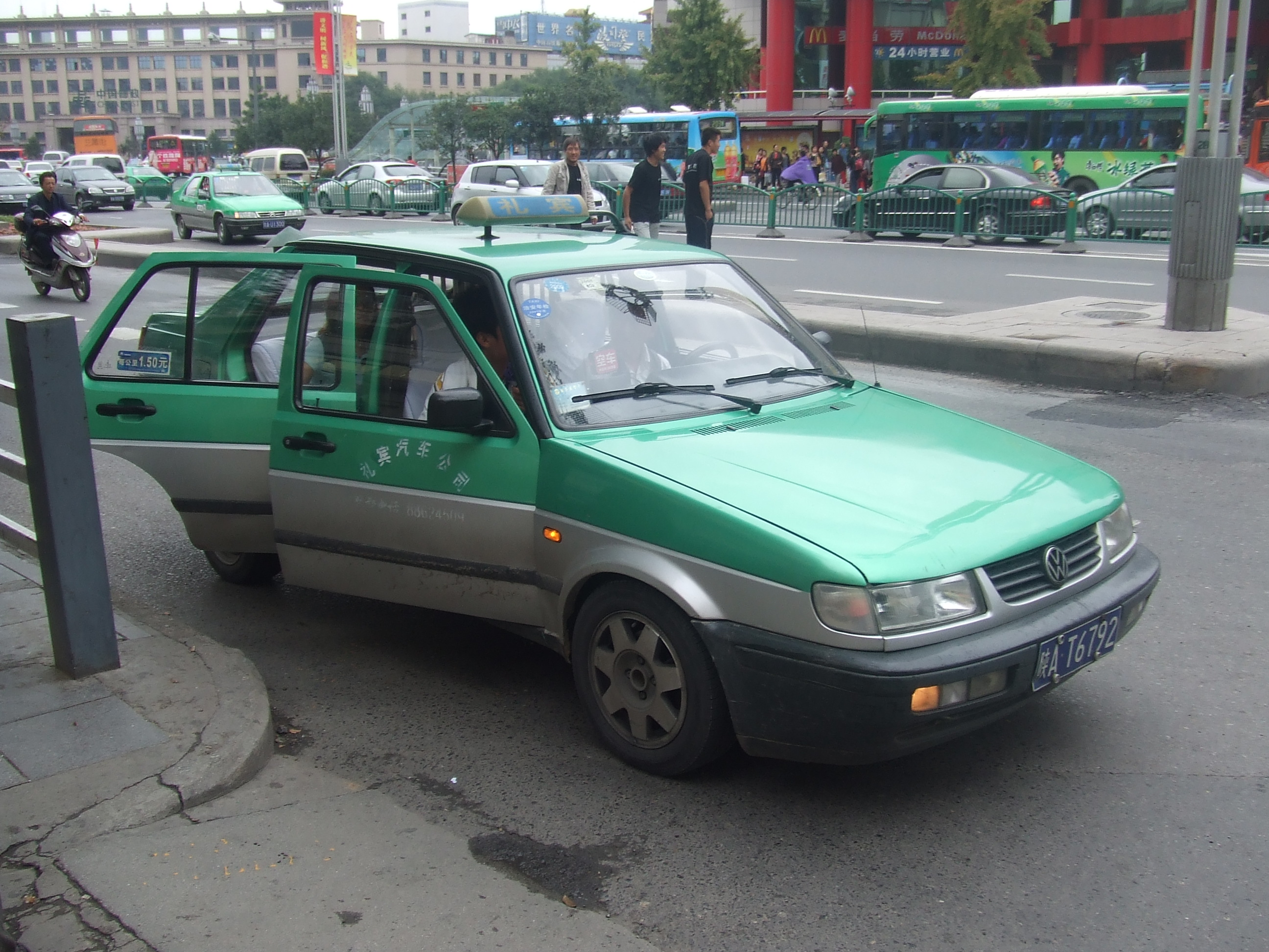 FAW Volkswagen Jetta Taxi - Xi'an, China